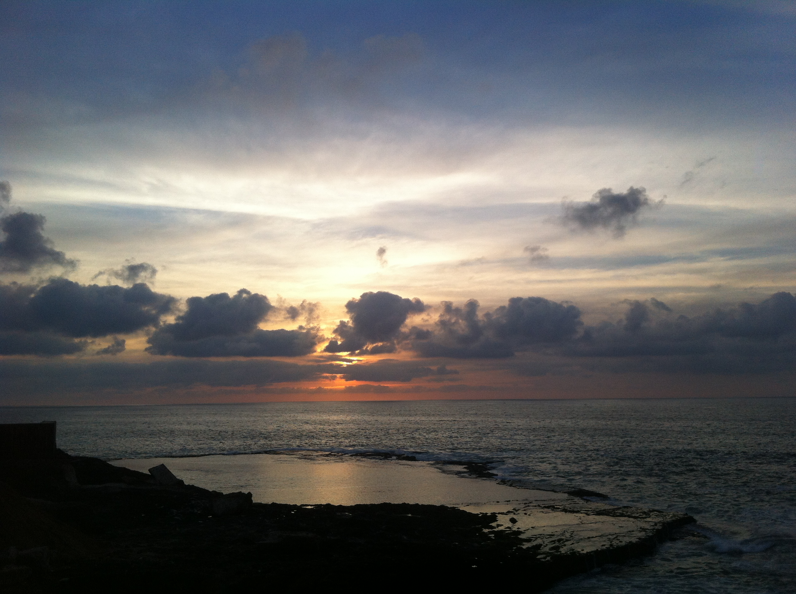 Coucher de soleil à côté du quartier l'Océan, Rabat.